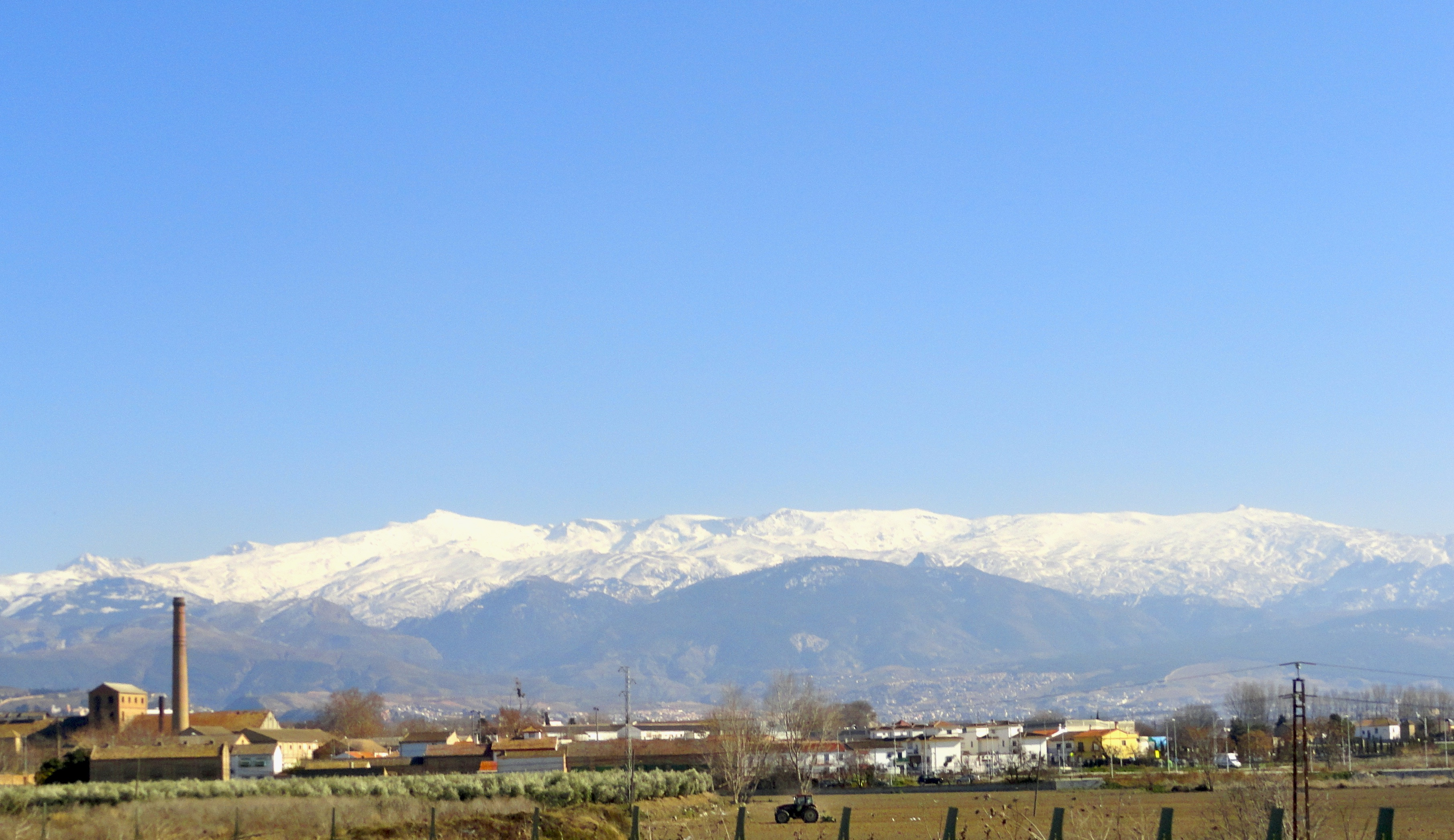 Sierra Nevada (Spanien) from Granada